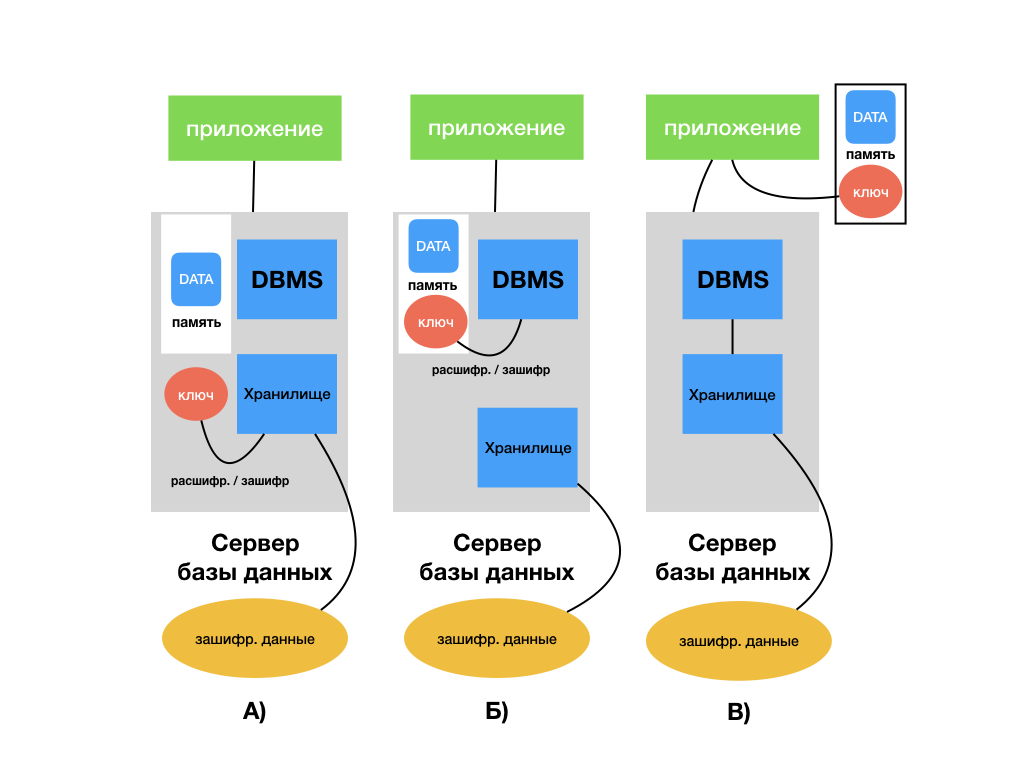 Типы шифрования базы данных